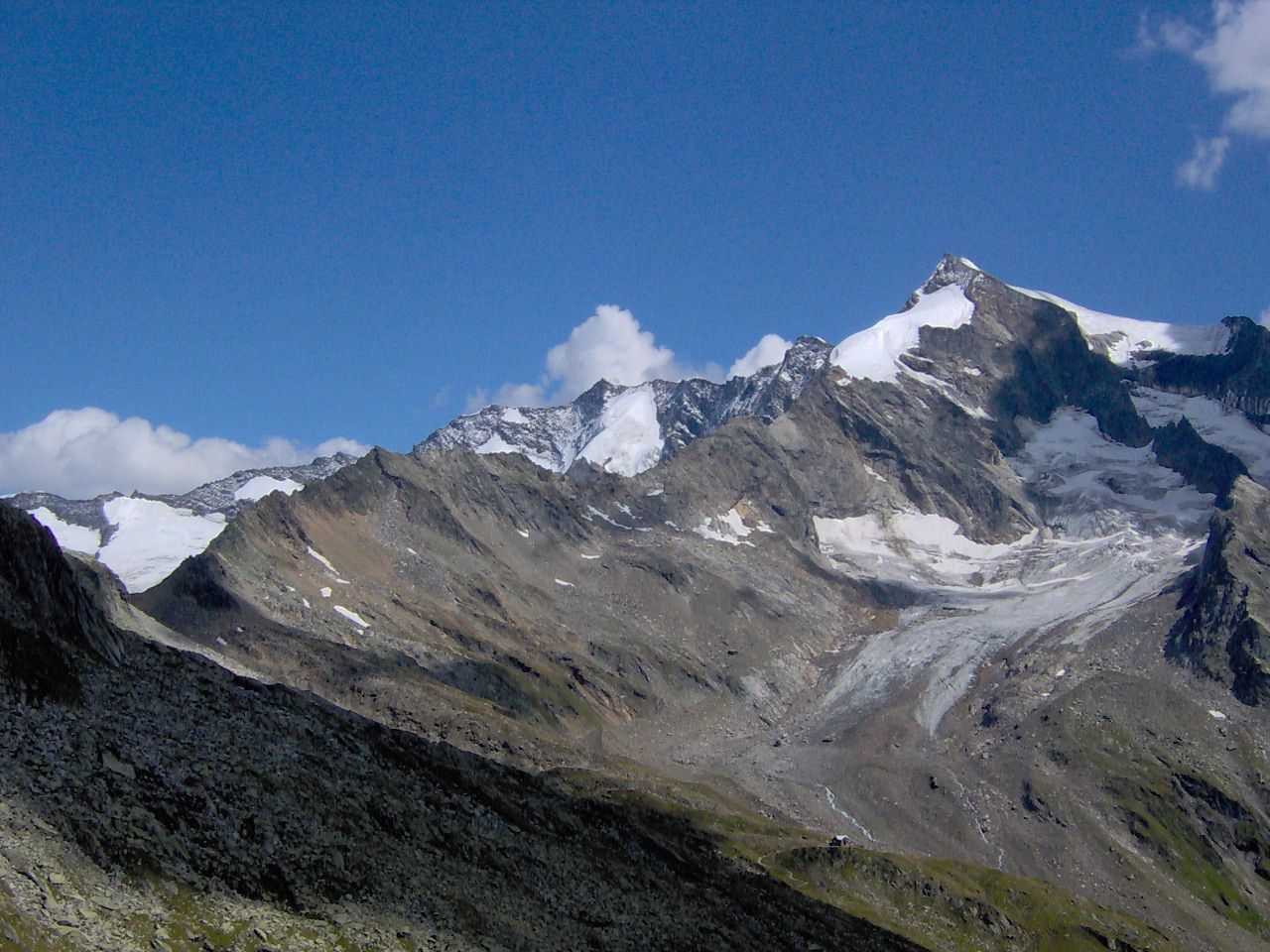 Il Rifugio Brigata Tridentina sotto il Picco dei Tre Signori. Foto scattata lungo la Lausitzer Weg nell'agosto 2007